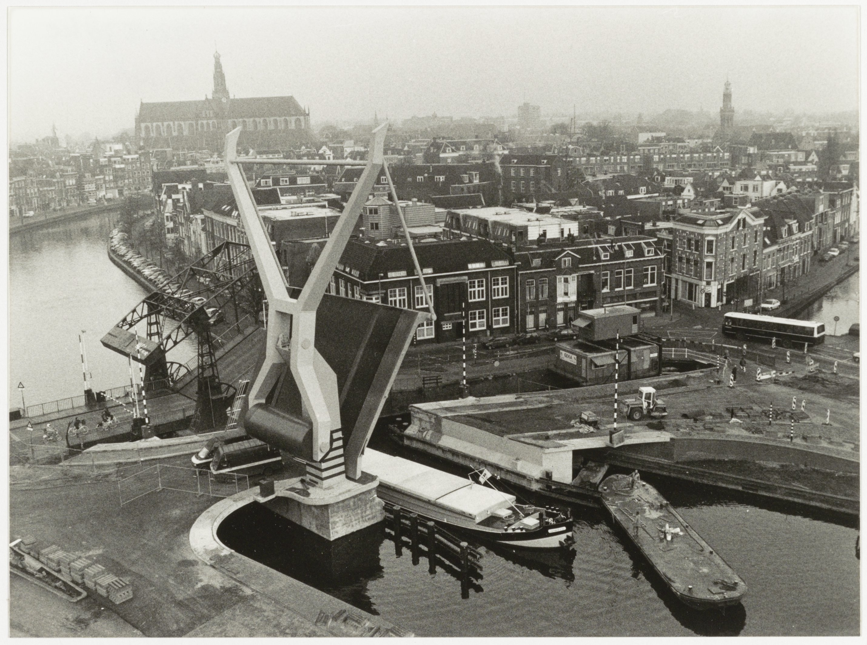 De oude en de nieuwe Langebrug nog naast elkaar. De nieuwe brug ("de verfroller") is van architect Asselbergs.